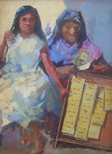 fotografía del cuadro El Pedacito premiado del pintor Marco Ernesto